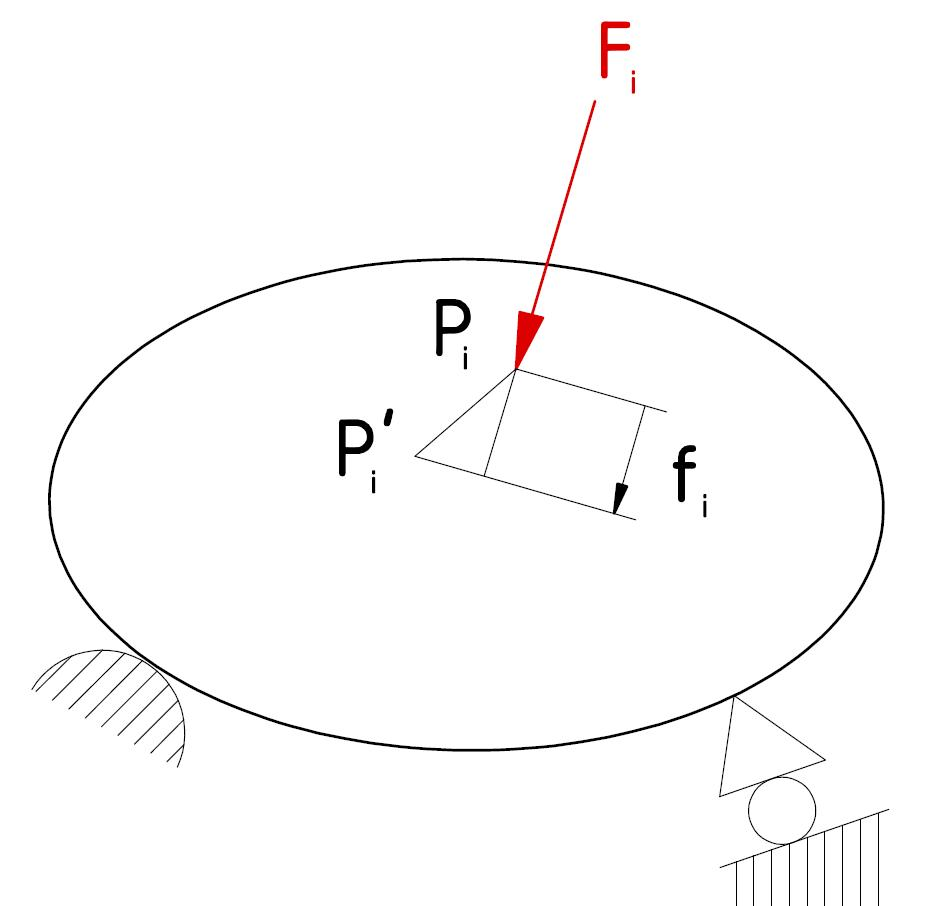 segédlet a Castigliano-tétel szócikkhez